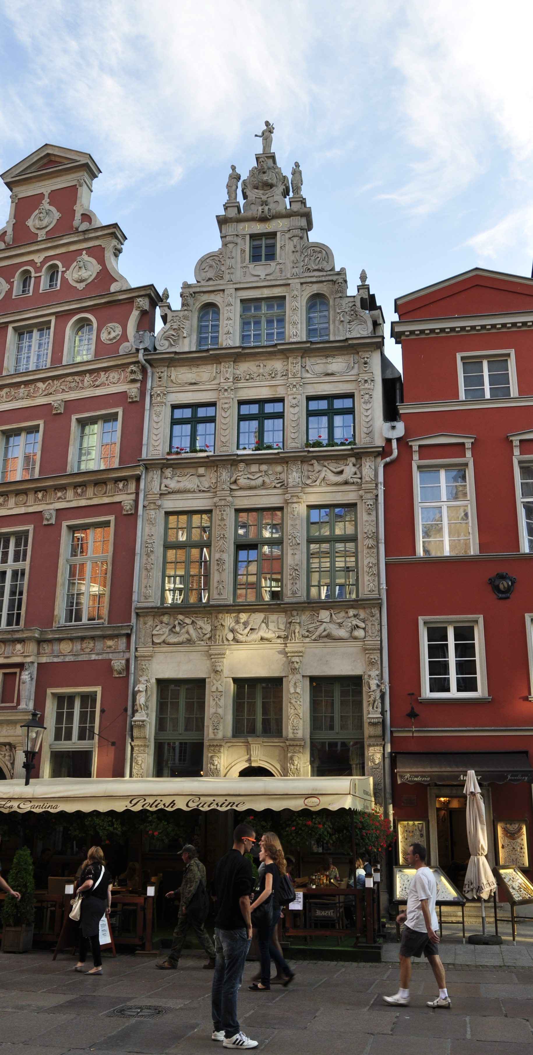 Gdańsk Główne Miasto - kamienice mieszczańskie przy ul. Długiej, od lewej: 38 (fragment), 37 i 36 (fragment).